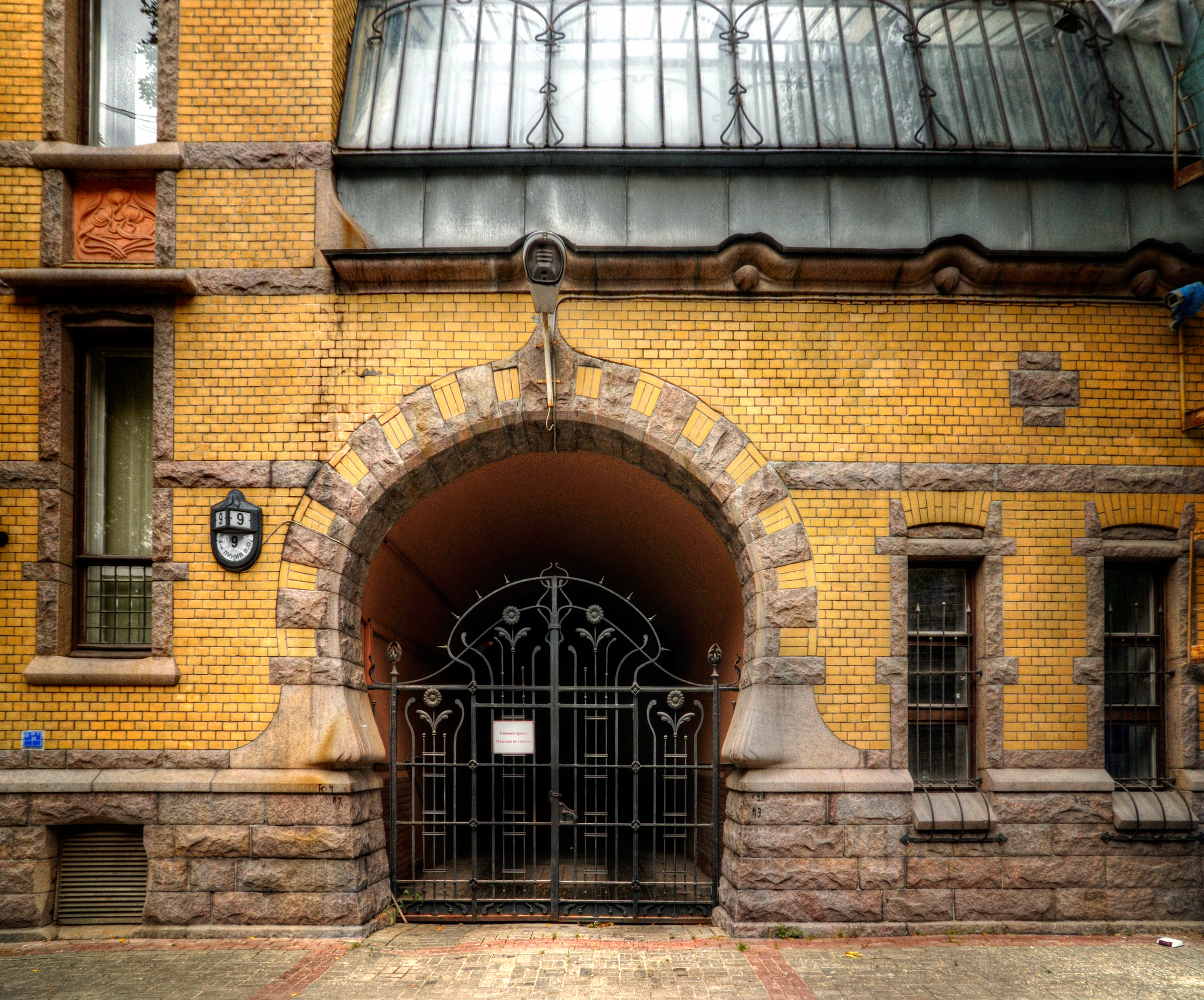 дом Форостовского П. П. Ворота